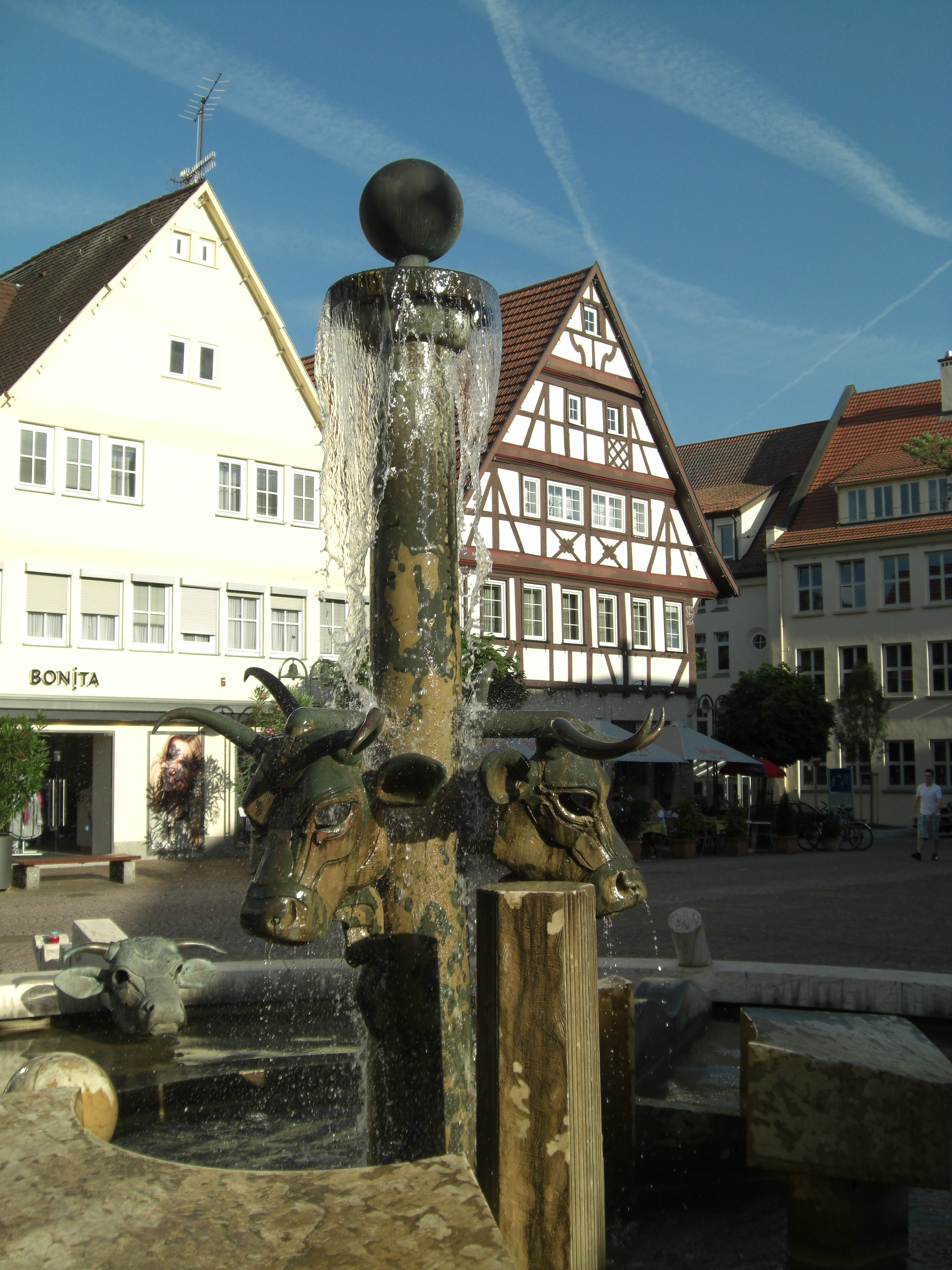 Ochsenbrunnen, Innenstadt, Nürtingen